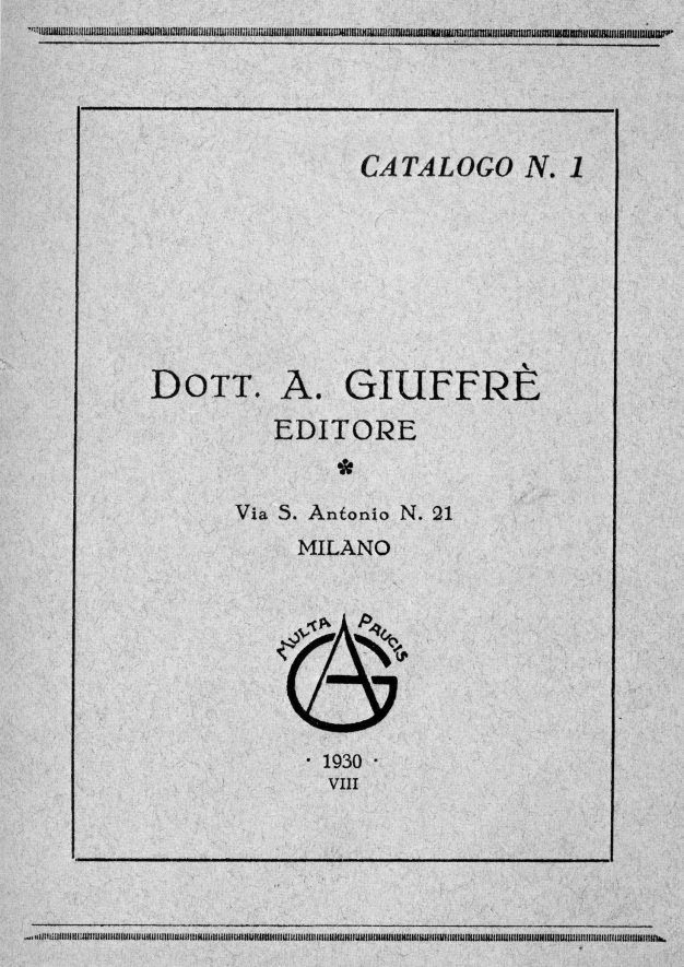 la foto ritrae lo storico catalogo n. 1 della Giuffrè editore